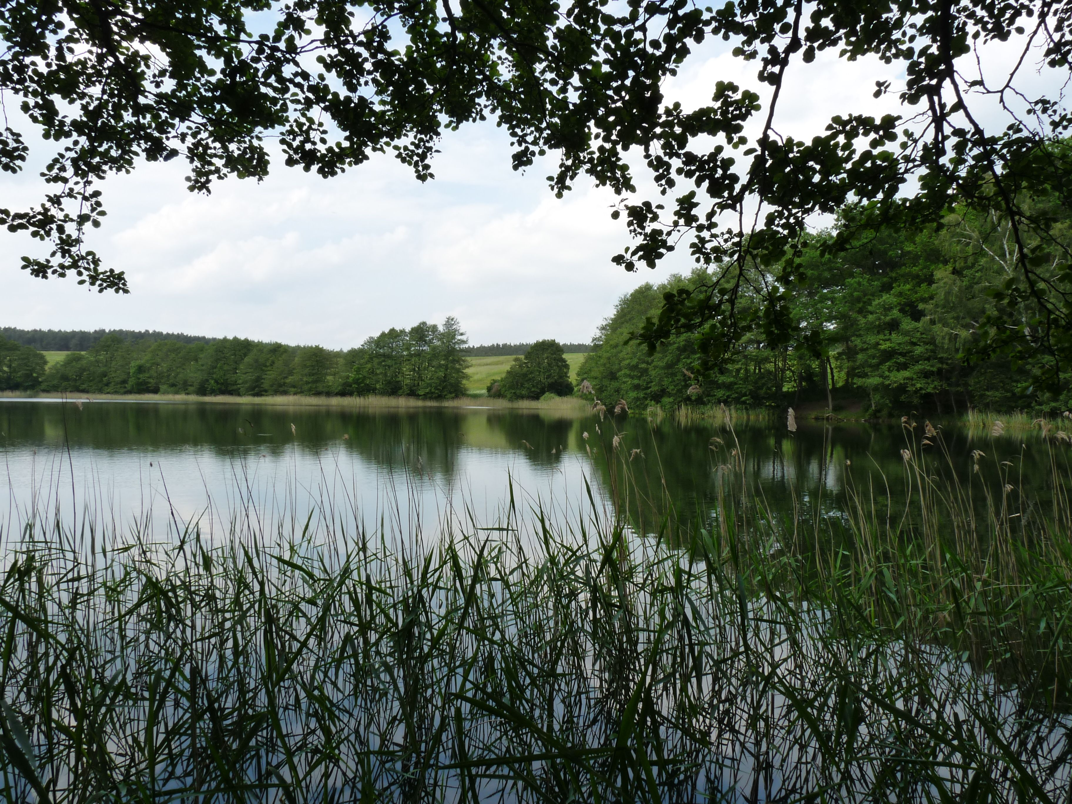 Der Glammsee in Mecklenburg, in Nähe des Dorfes Witzin, und nicht zu verwechseln mit dem gleichnamigen See bei der mecklenburgischen Stadt Warin. - Google Maps - Google Earth